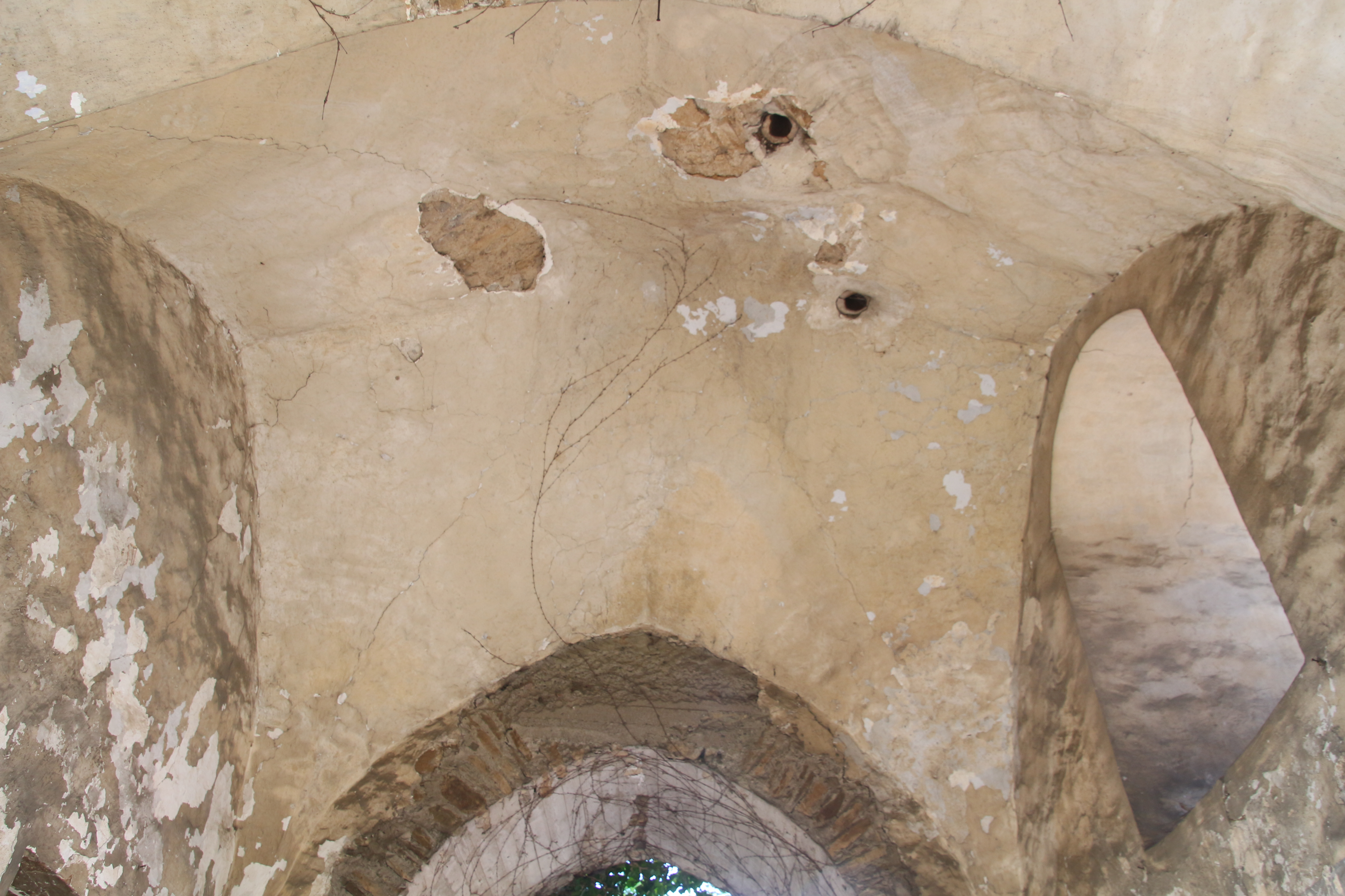 Siehe Bild und Dateiname